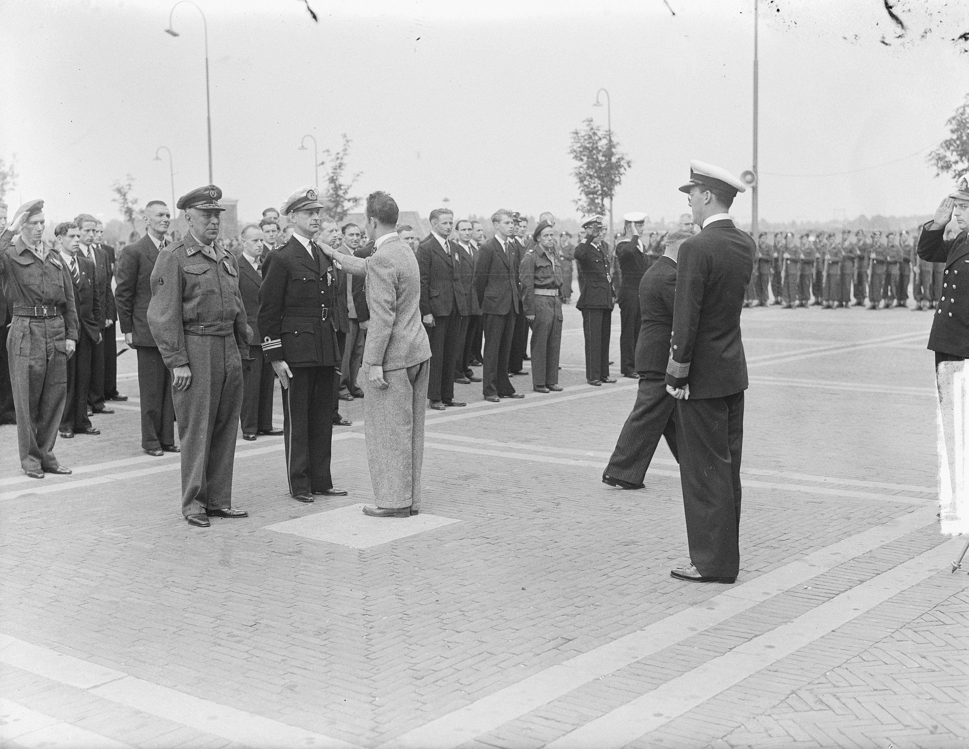 Collectie / Archief : Fotocollectie Anefo Reportage / Serie : [ onbekend ] Beschrijving : Uitreiking Militaire Willems-Orde door prins Bernhard aan generaal-majoor der Infanterie van het KNIL S. de Waal (links) en majoor der Mariniers C.G. Lems in de mariniershaven Rotterdam. Datum : 13 september 1949 Locatie : Rotterdam, Zuid-Holland Trefwoorden : marine, militairen, officieren, onderscheidingen Persoonsnaam : Lems, Cornelis Gerardus, Waal, Simon de Instellingsnaam : MWO Fotograaf : Winterbergen, […] / Anefo Auteursrechthebbende : Nationaal Archief Materiaalsoort : Glasnegatief Nummer archiefinventaris : bekijk toegang 2.24.01.09 Bestanddeelnummer : 903-6039